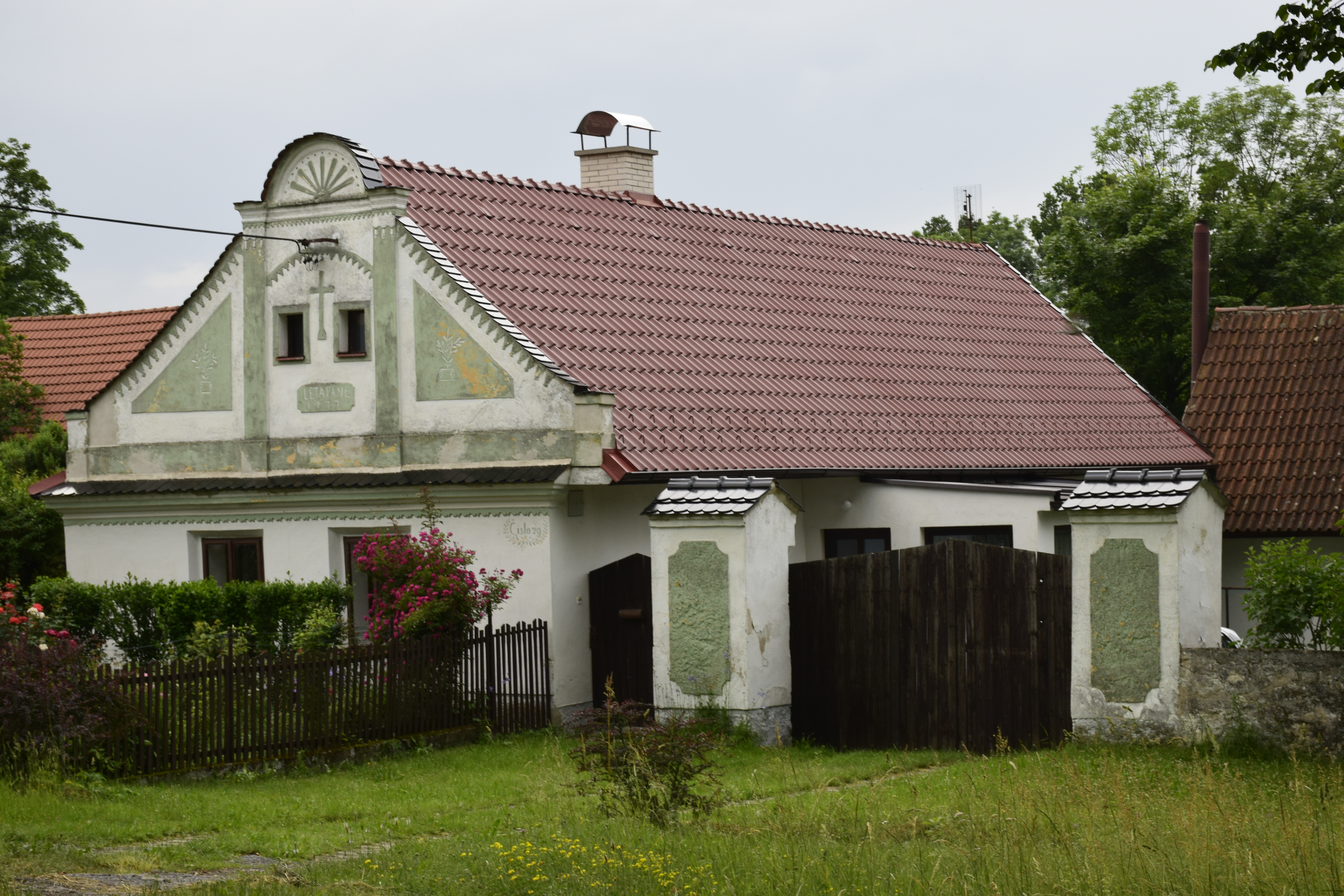 Maršov (Malšice), Česká republika.